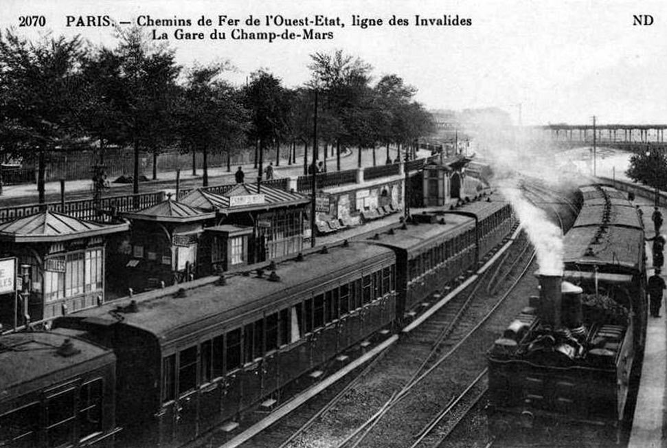 Train à vapeur en gare du Champ de Mars sur la ligne des Invalides